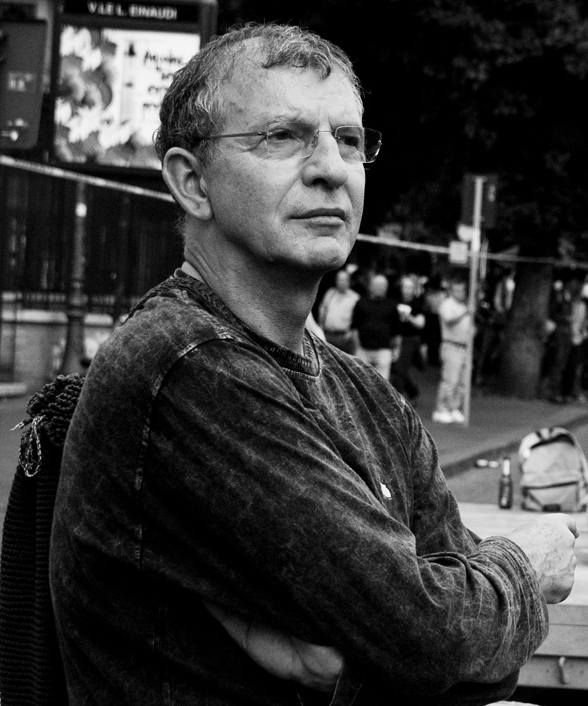 Aldo Busi a Roma